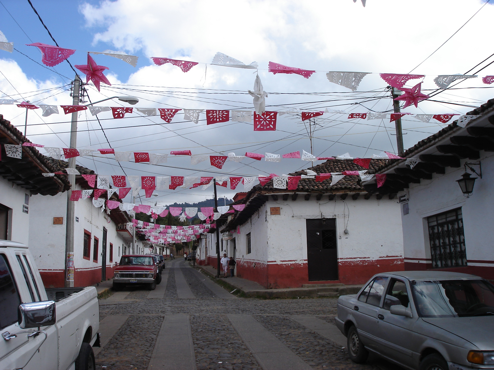 Calle de Mazamitla